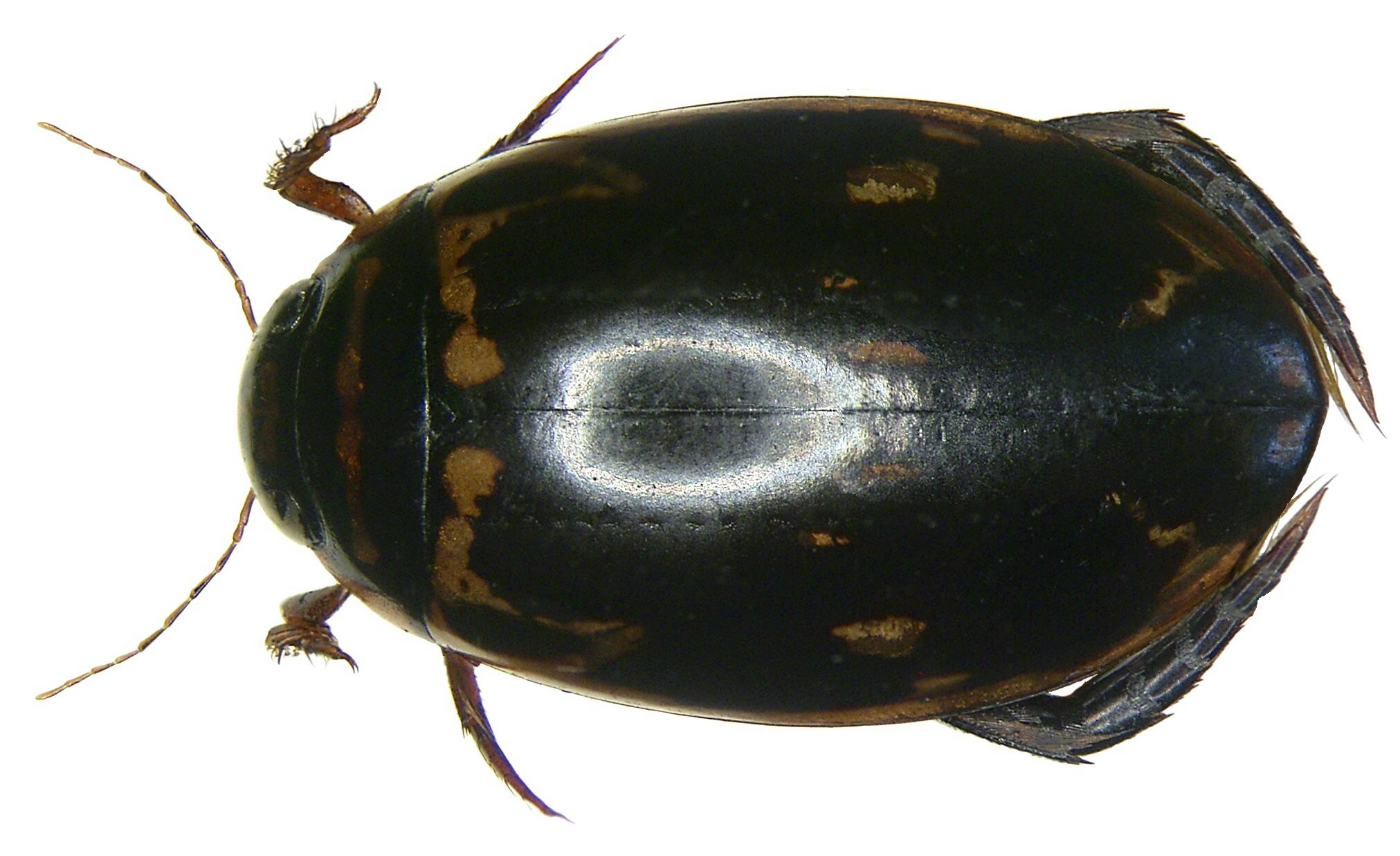 Sandracottus guerini Balfour-Browne, 1939 Familie: Dytiscidae Grösse: 11,8 mm Fundort: Indonesien, Batanta Isl., Arefi leg. A.Skale, 2004; det. Hendrich Foto: U.Schmidt, 2007